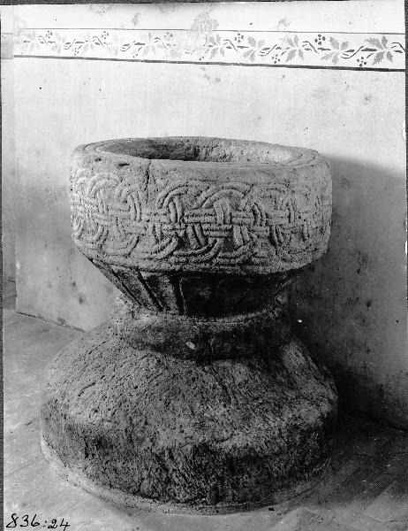 Dopfunt, sandsten, ringflätningar på cuppan. Kategori: (04) DopfuntarDopfunt, sandsten, ringflätningar på cuppan.